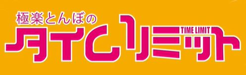 「極楽とんぼのタイムリミット」ロゴ